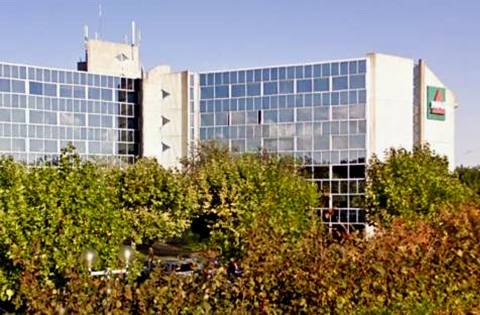 Le siège social (Niort-Noron)